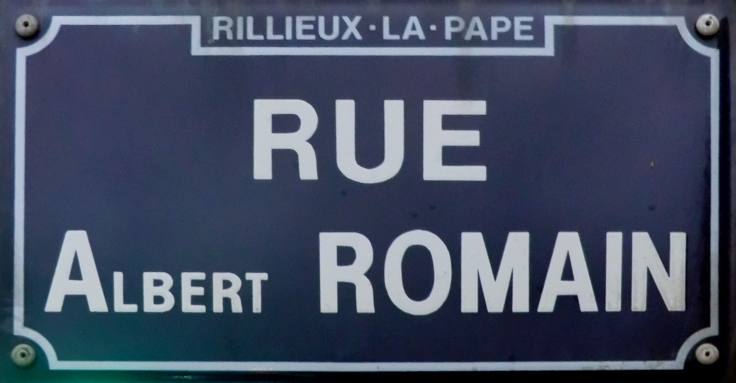 Rue Albert-Romain (ancien maire de Crépieux).